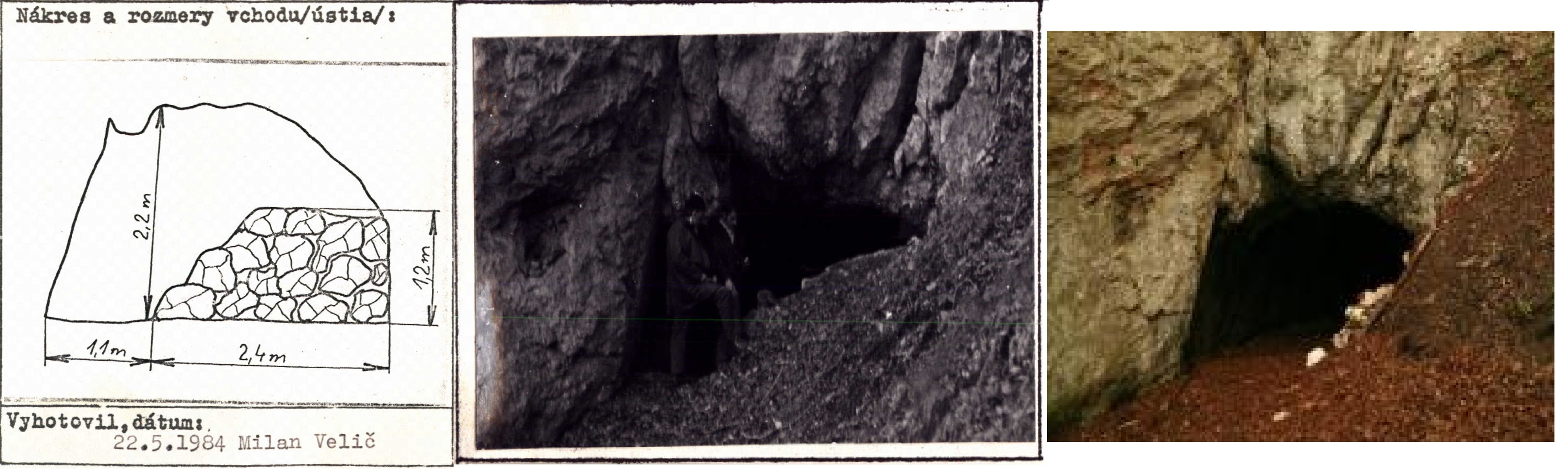 Zobrazenie valu pri vchode do jaskyne z čias 2. SV a ´vchod do jaskyne po jeho odstránení.